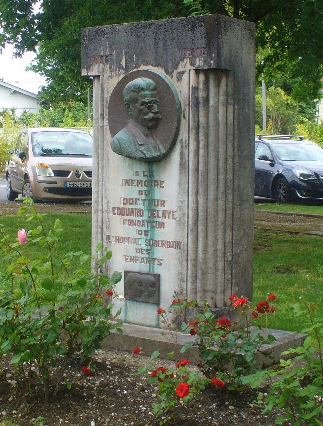 Hopital-suburbain